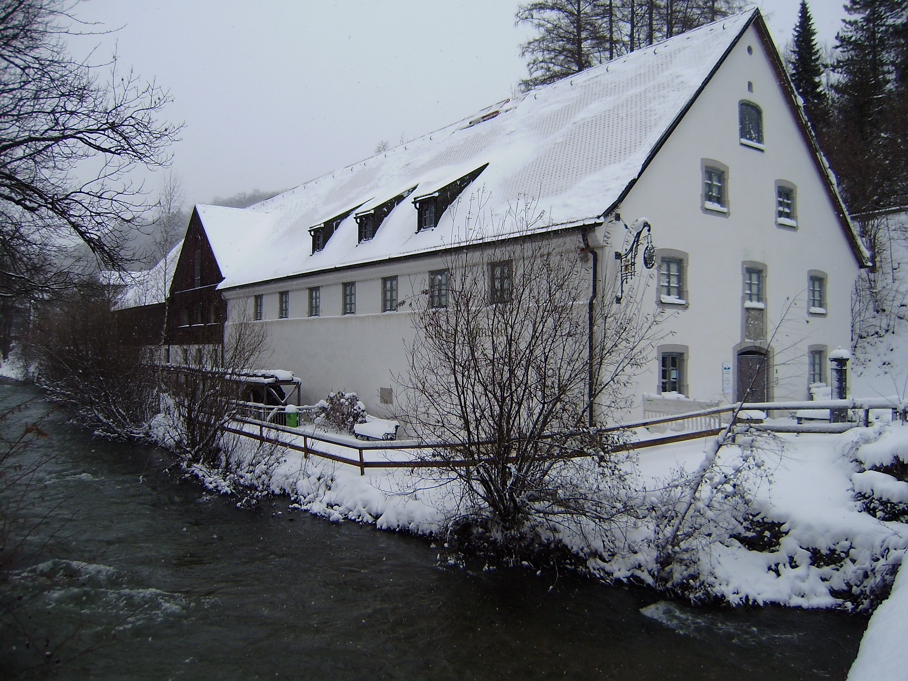 Hofmühle, An der Ach 14, Immenstadt im Allgäu. 1763 im Auftrag von Franz Hugo Graf von Königsegg-Rothenfels erbaut, heute Heimatmuseum und Stadtarchiv.